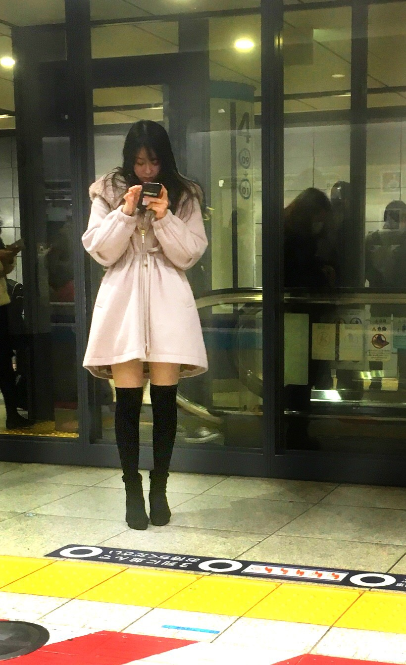 Knee-high boots (ニーハイブーツ)